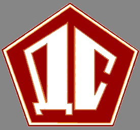 Официальная эмблема Государственного треста "Дальстрой", утверждённая Э. П. Берзиным 14.11.1934 г.